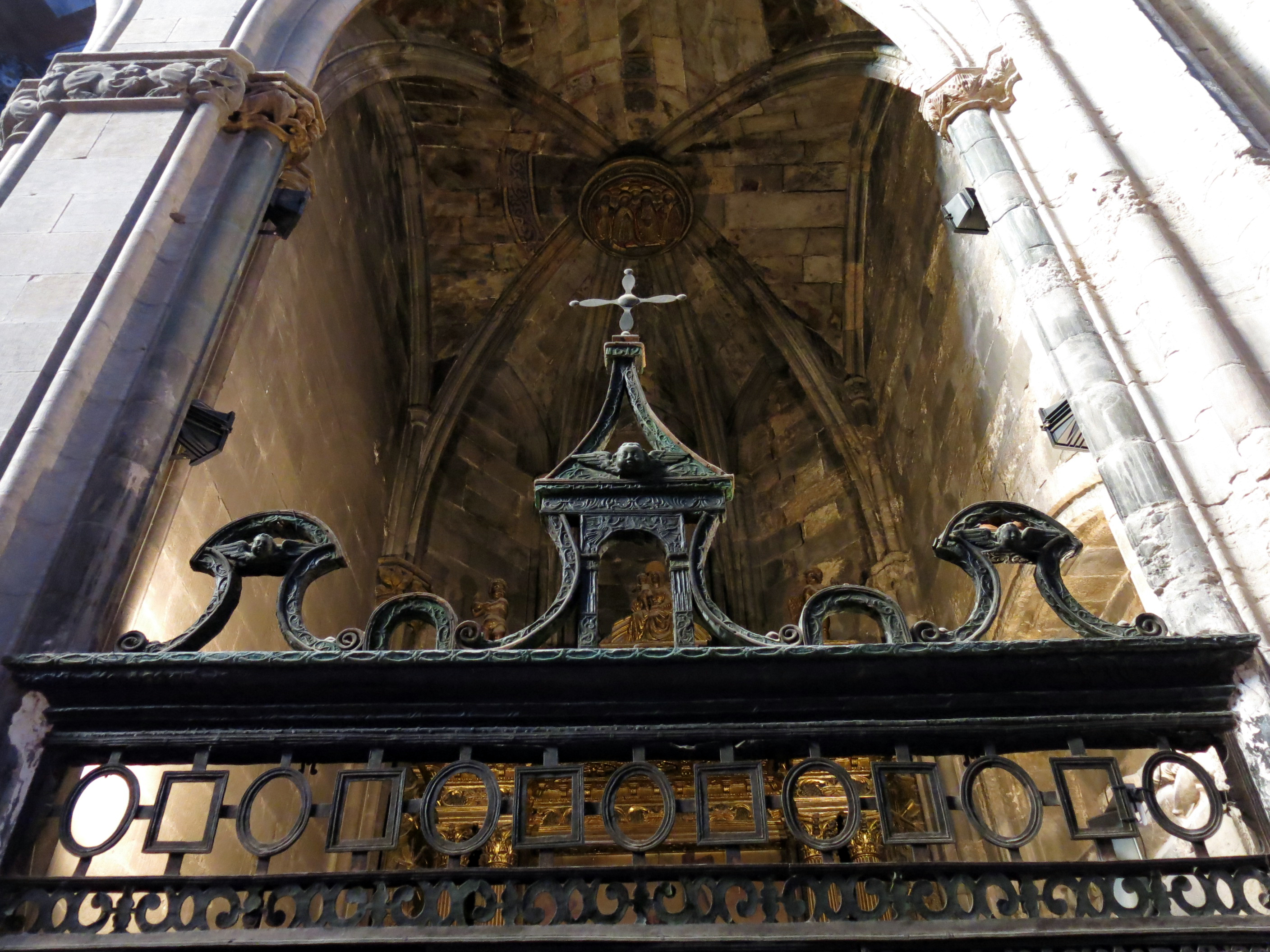 Catedral de Santa Maria (Girona)